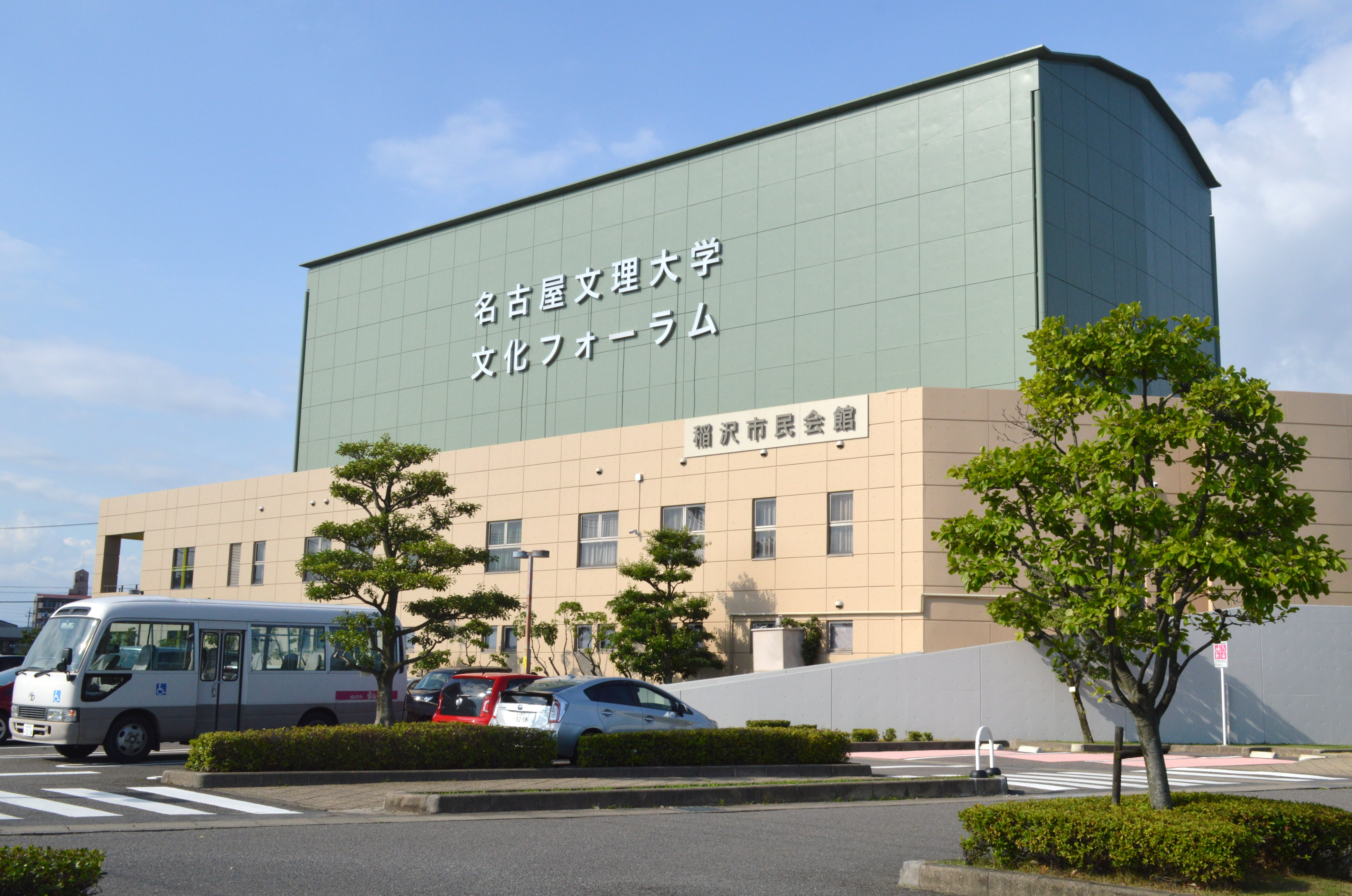 稲沢市民会館（命名権名称 : 名古屋文理大学文化フォーラム）